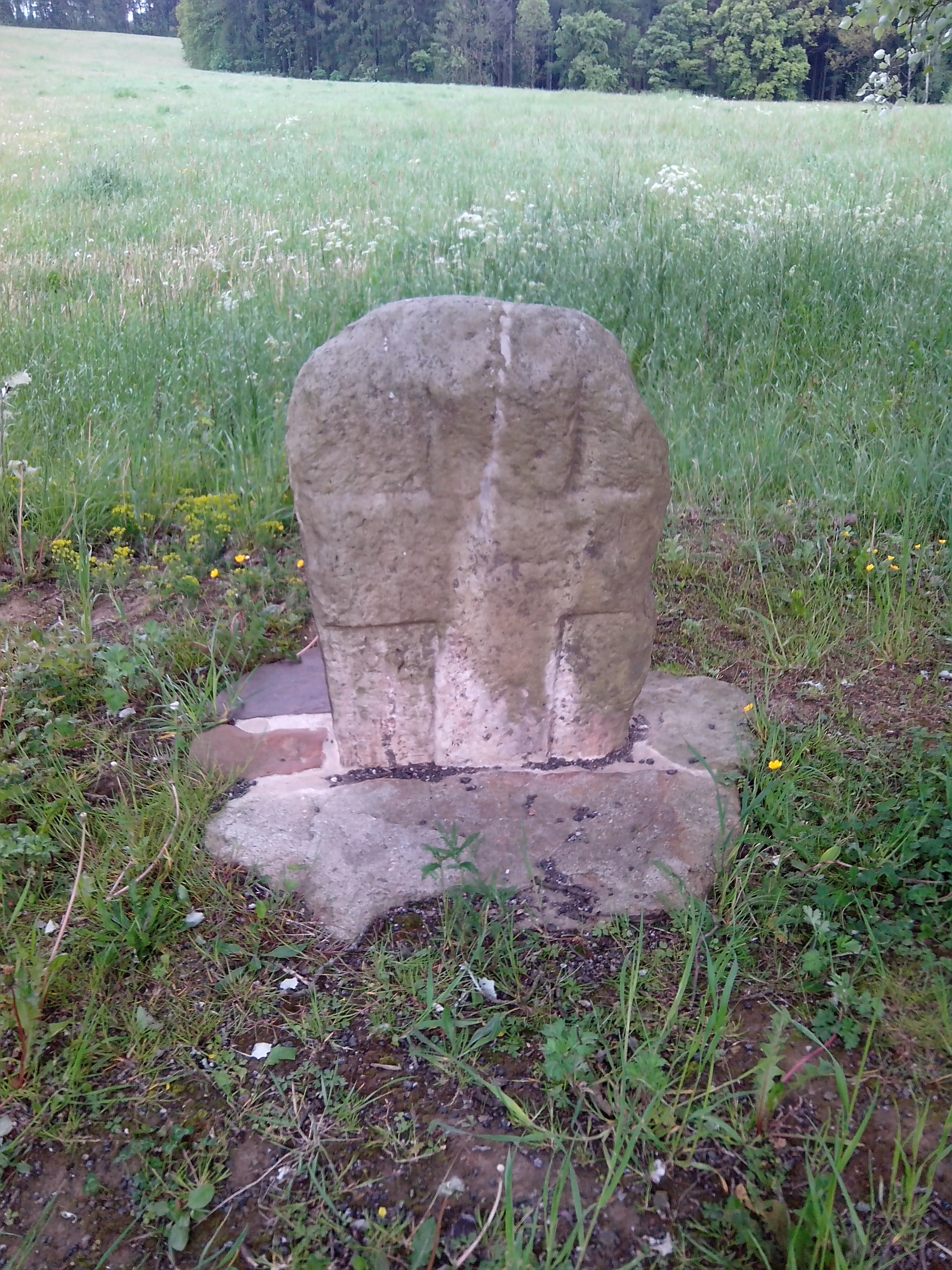 Kohoutov - křížový kámen